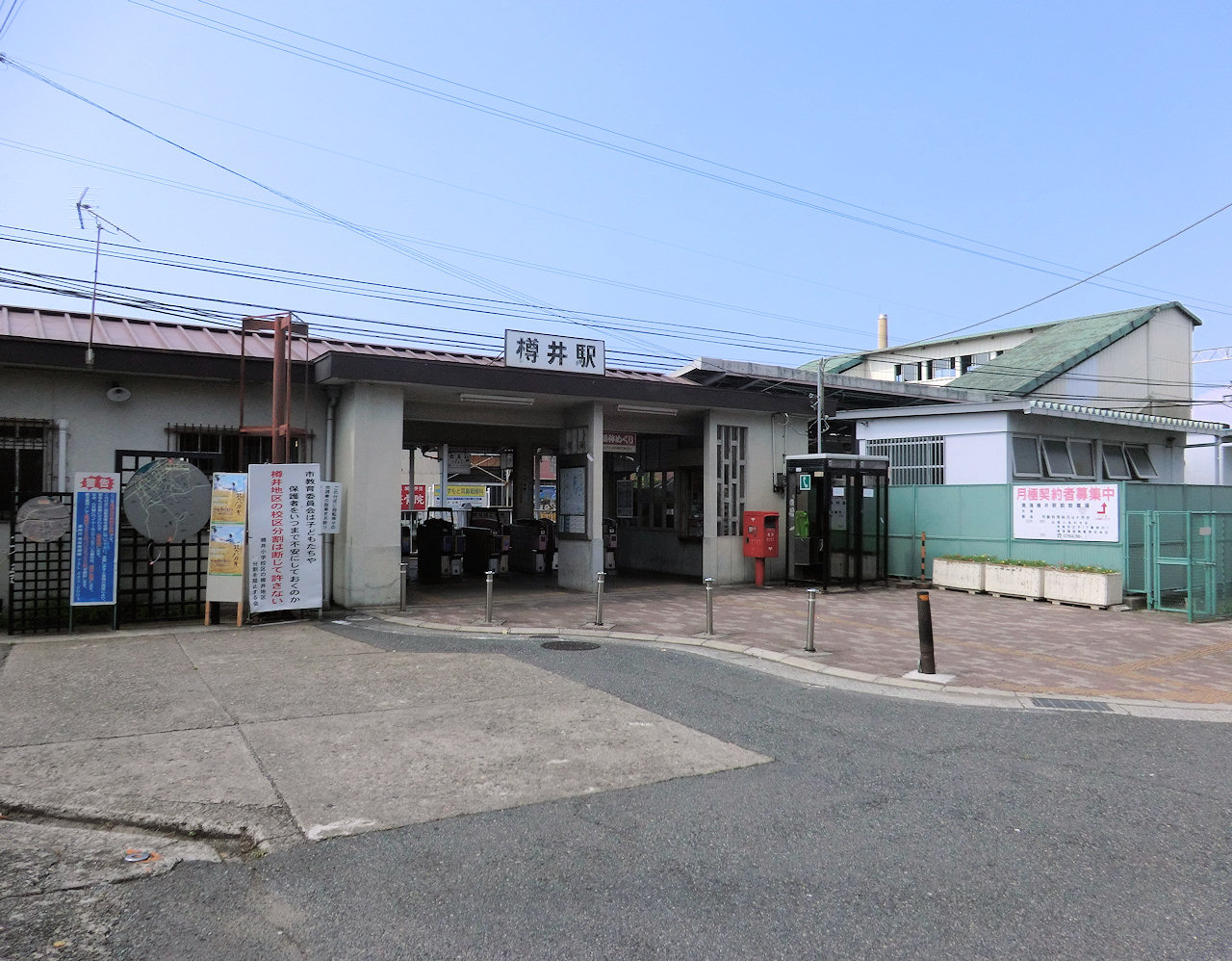 樽井駅